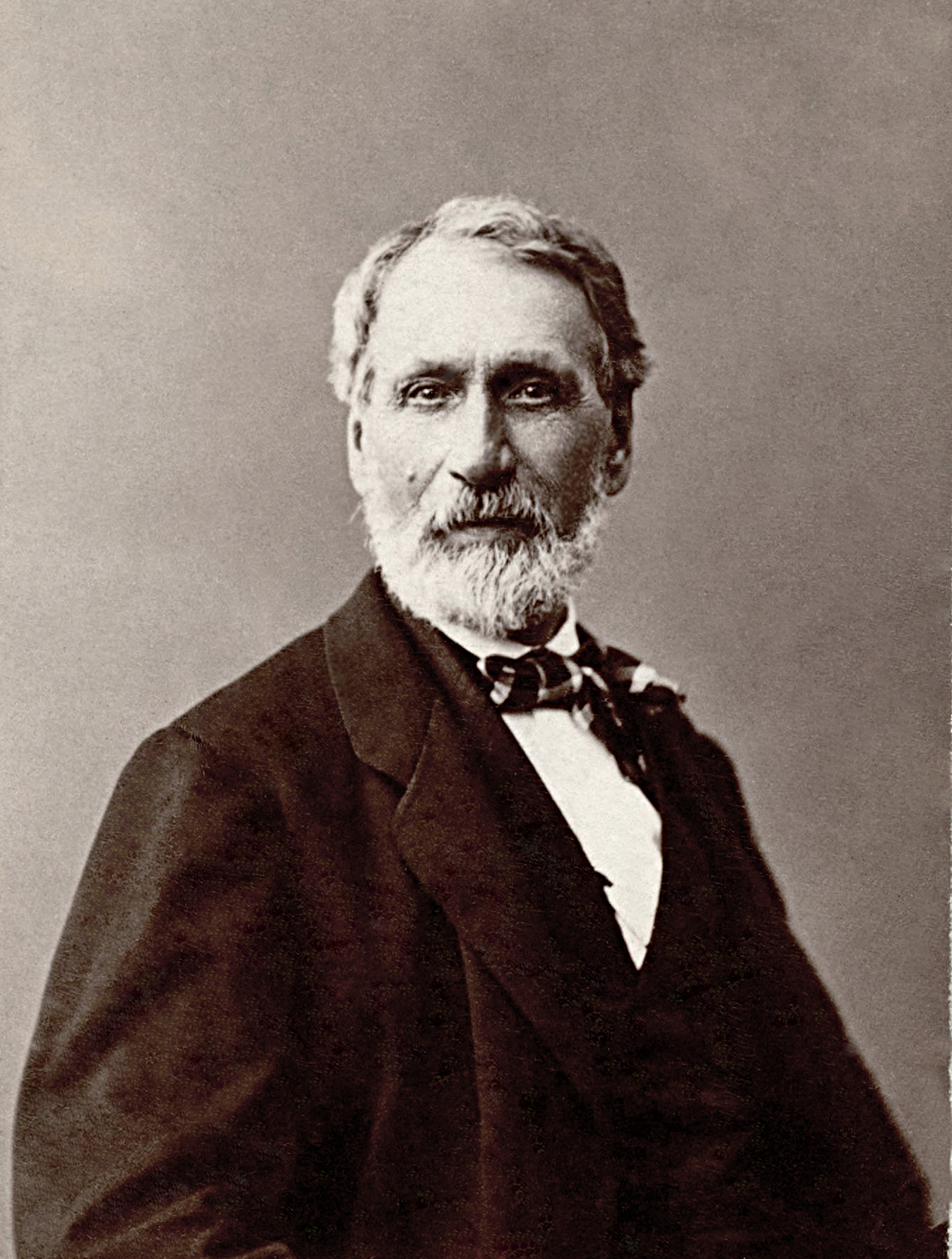 Auguste Chevrolat (1799 - 1884), entomologiste français.